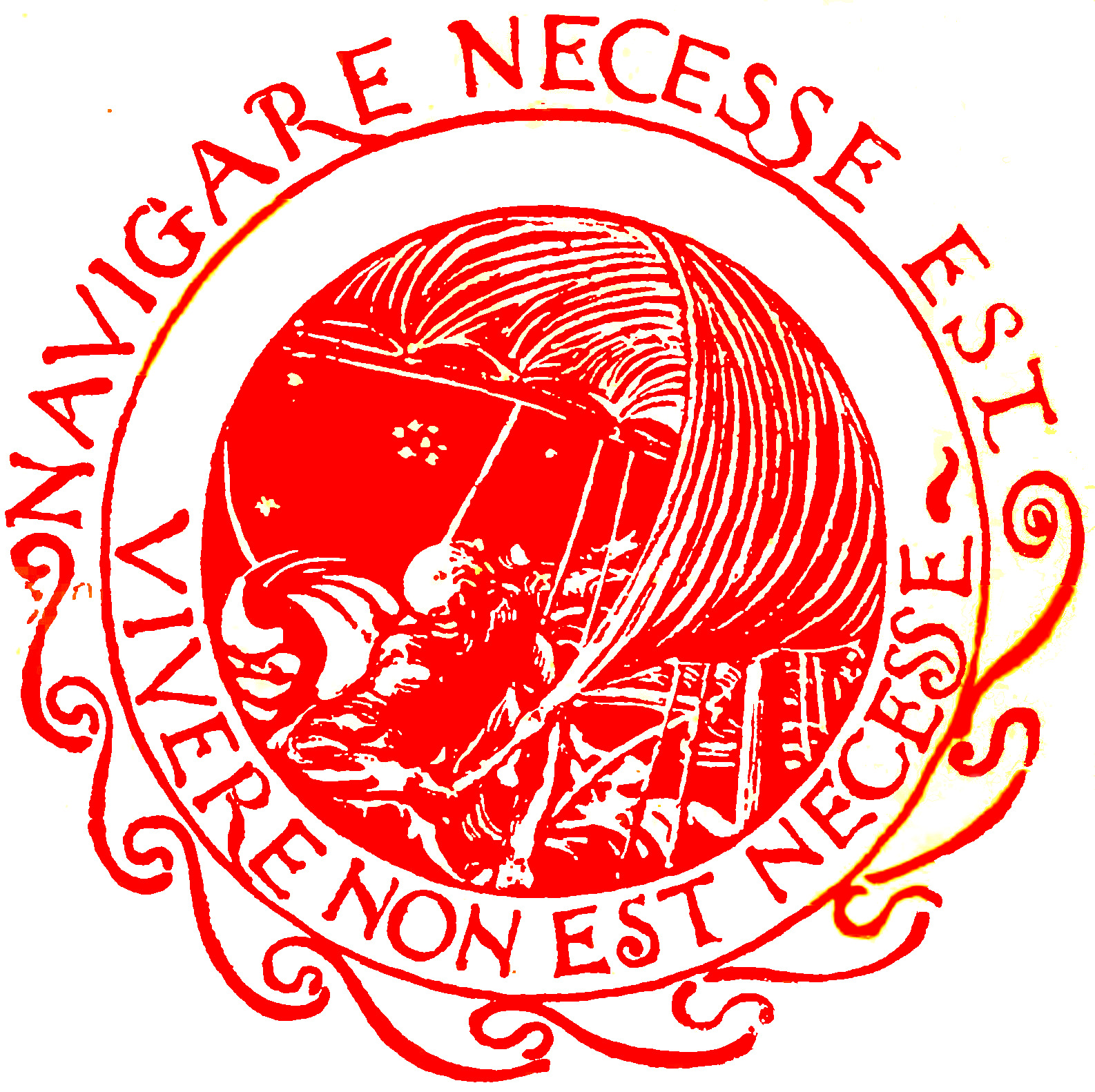 Raccolta di poesie di Gabriele D'Annunzio. libro 1. Maia. 1912. -libro 2. Elettra. 1912. -libro 3. Alcione. 1908. -libro 4. Merope. 2. ed. 1912